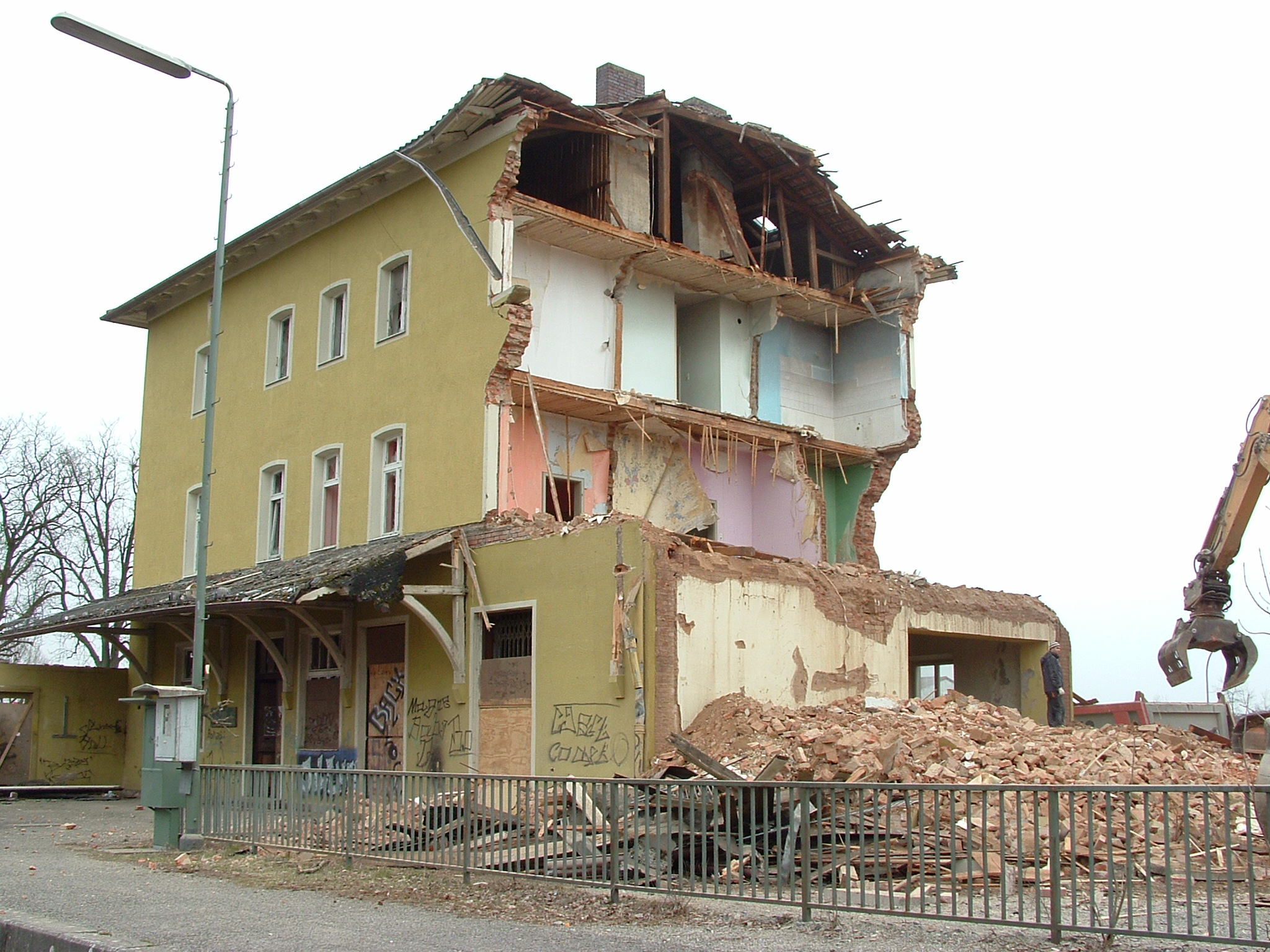 Abriss des Gebäudes - dort entsteht ein Drogeriemarkt, eine neue Bahnhaltestelle ist unmittelbar daneben geplant